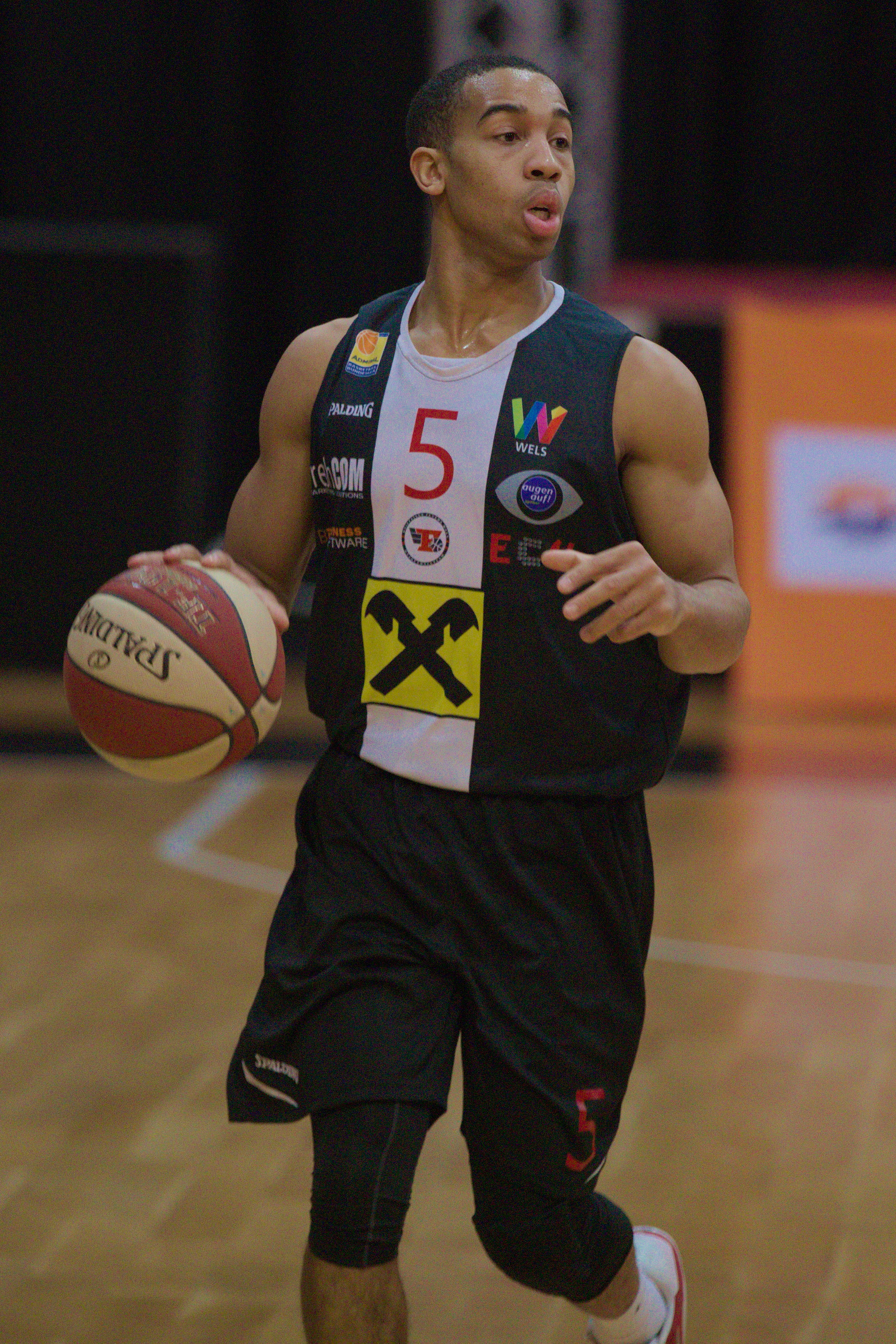 Siyani Chambers, Spieler der Raiffeisen Flyers Wels, beim Basketball-Bundesligaspiel gegen den BC Vienna, 21. Jänner 2018